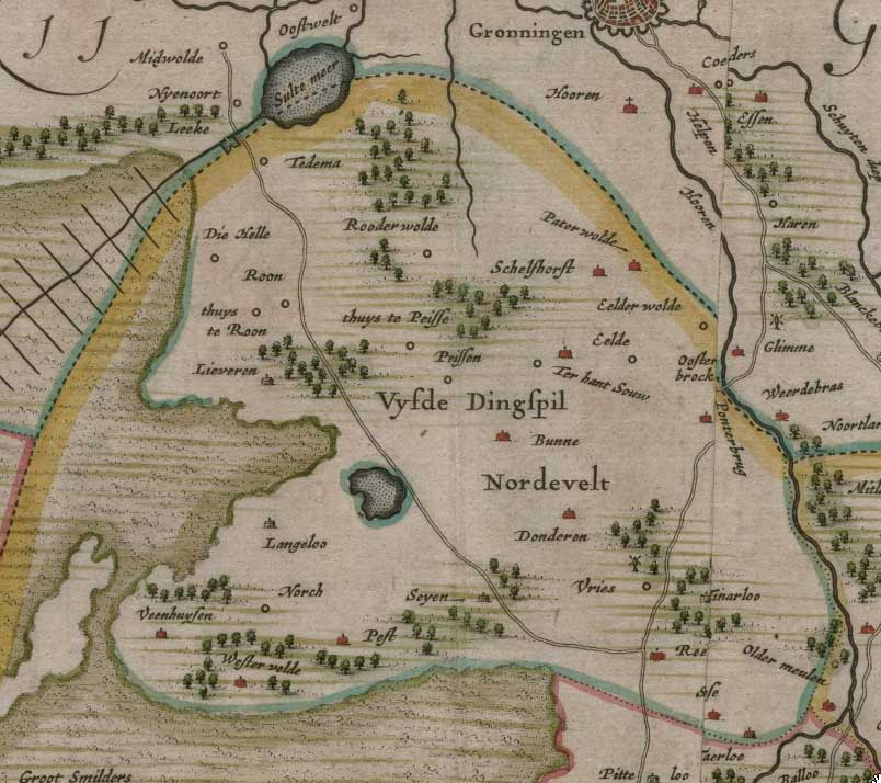 Oude kaart van Drenthe uit 1634 (fragment)